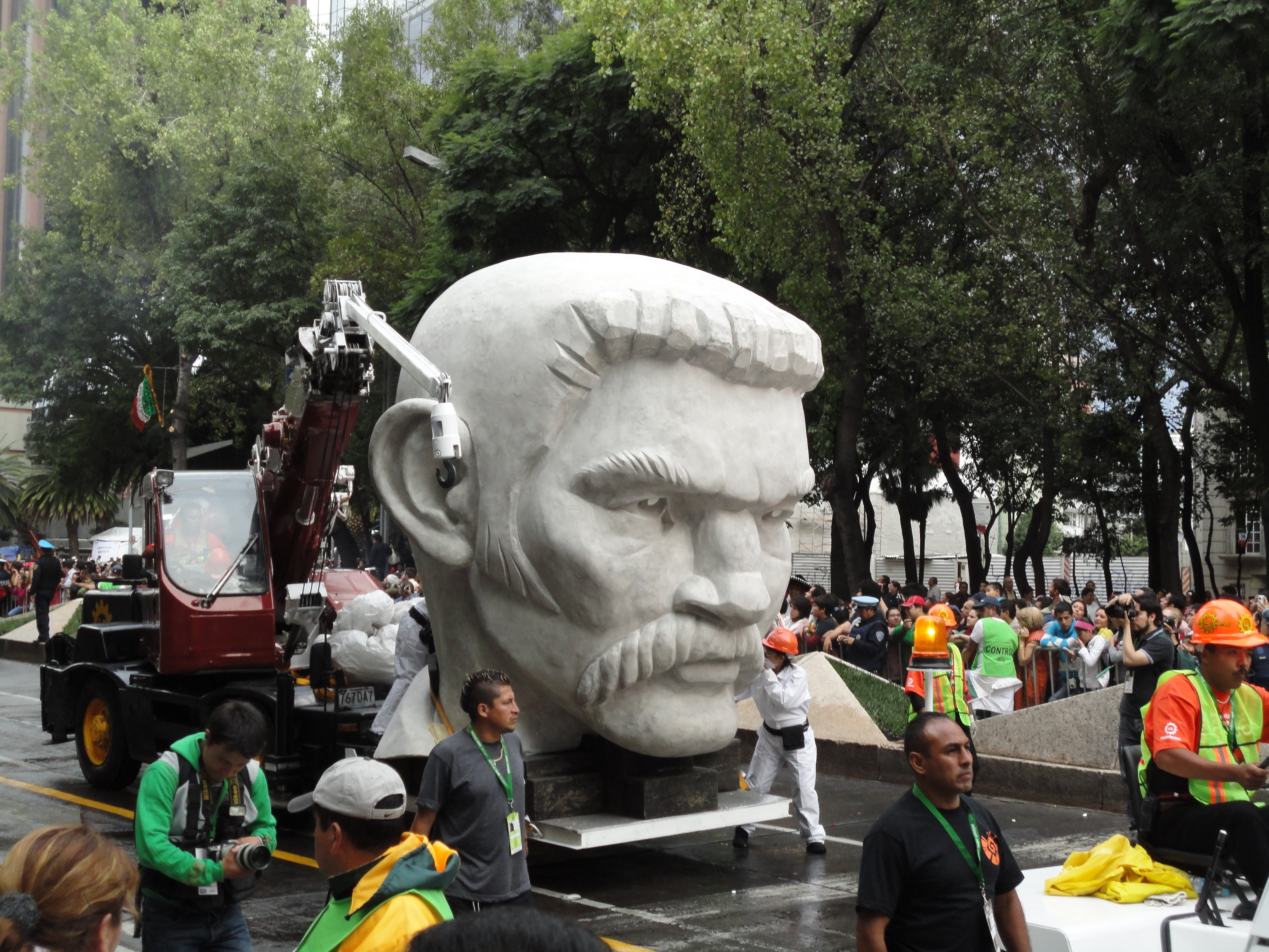 Parte de la escultura "El Coloso", desfilando por Paseo de la Reforma.